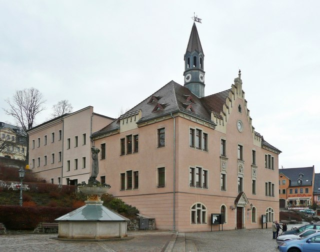 Hohenstein-Ernstthal: Blick zum Rathaus